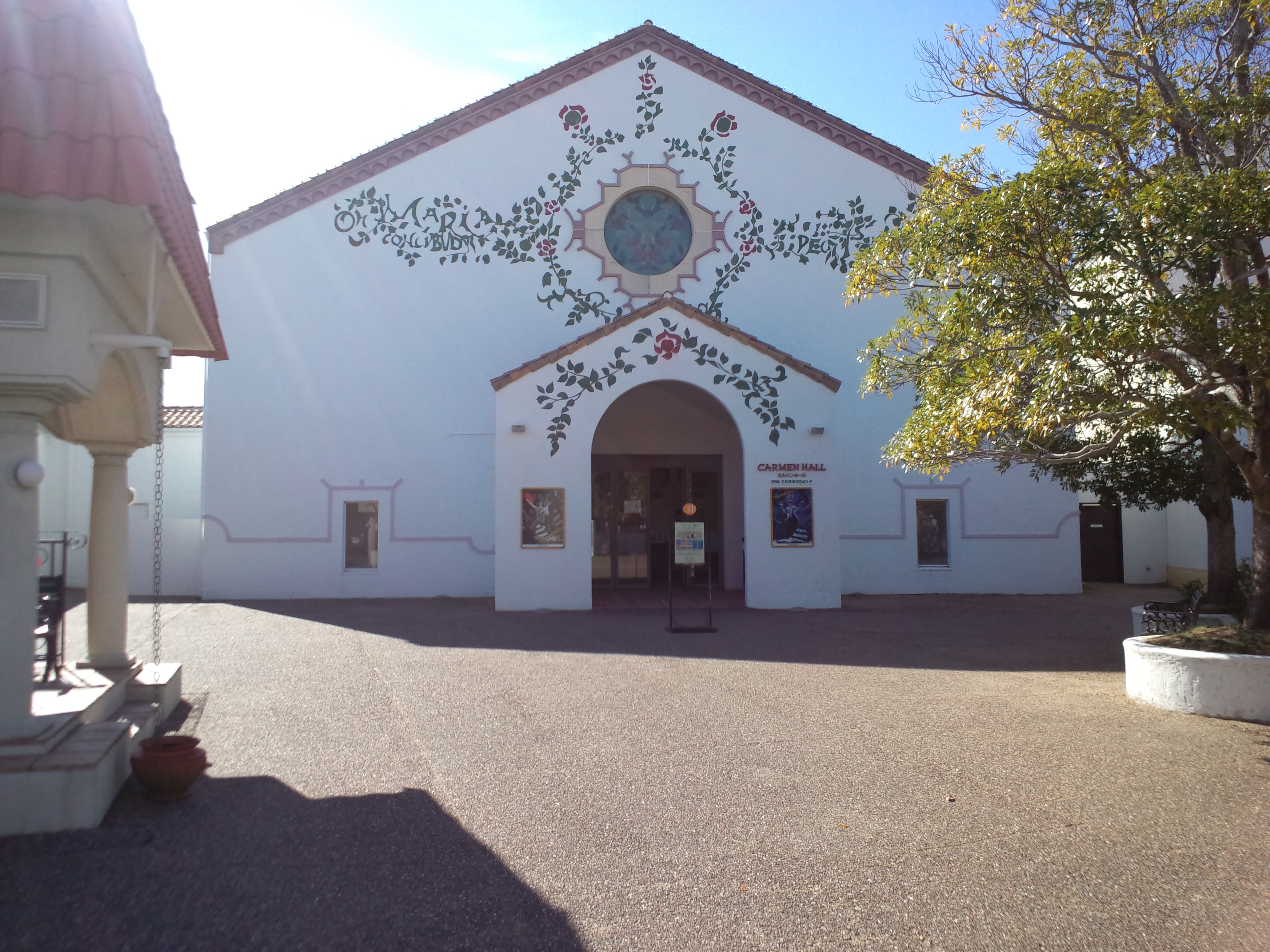 志摩スペイン村、パルケエスパーニャ カルメン・ホール